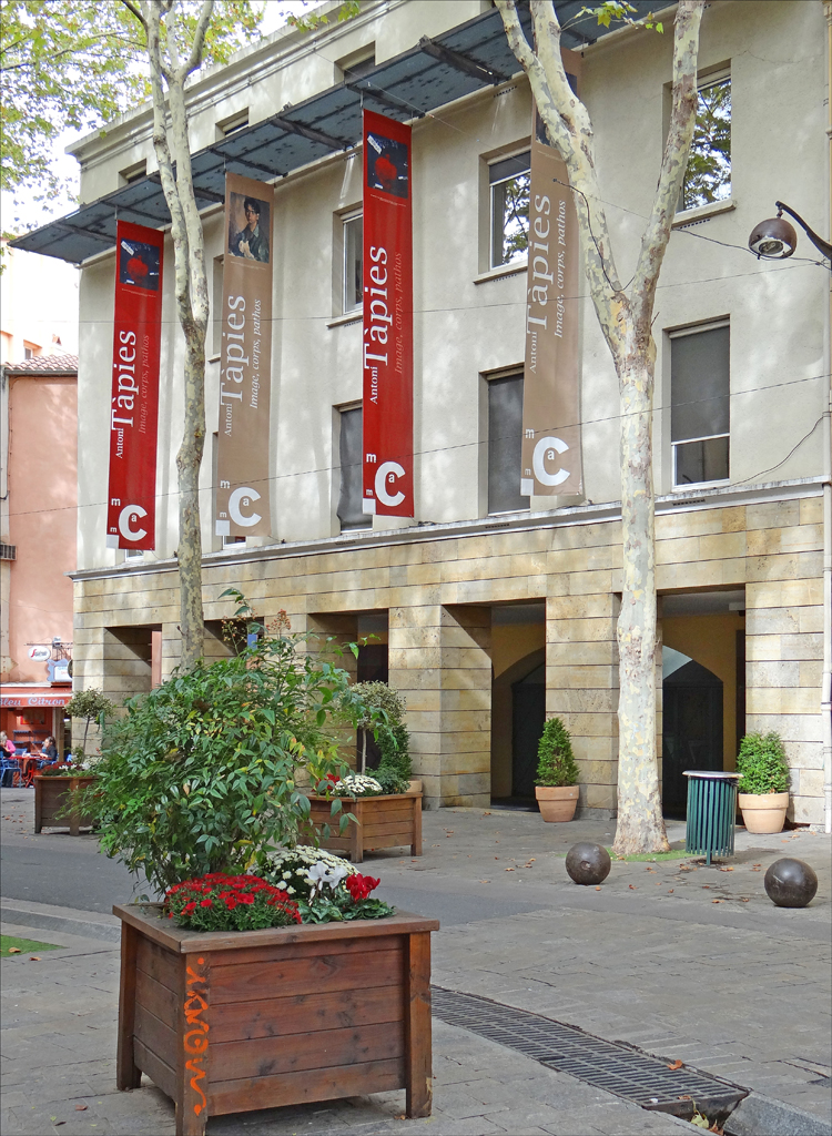 L'entrée du musée d'art moderne Site du musée d'art moderne de Céret Le futur musée des instruments MùSIC est situé à 200m du musée d'art moderne, en plein cœur de Céret Site du CIMP (Centre Internacional de Música Popular / músic)